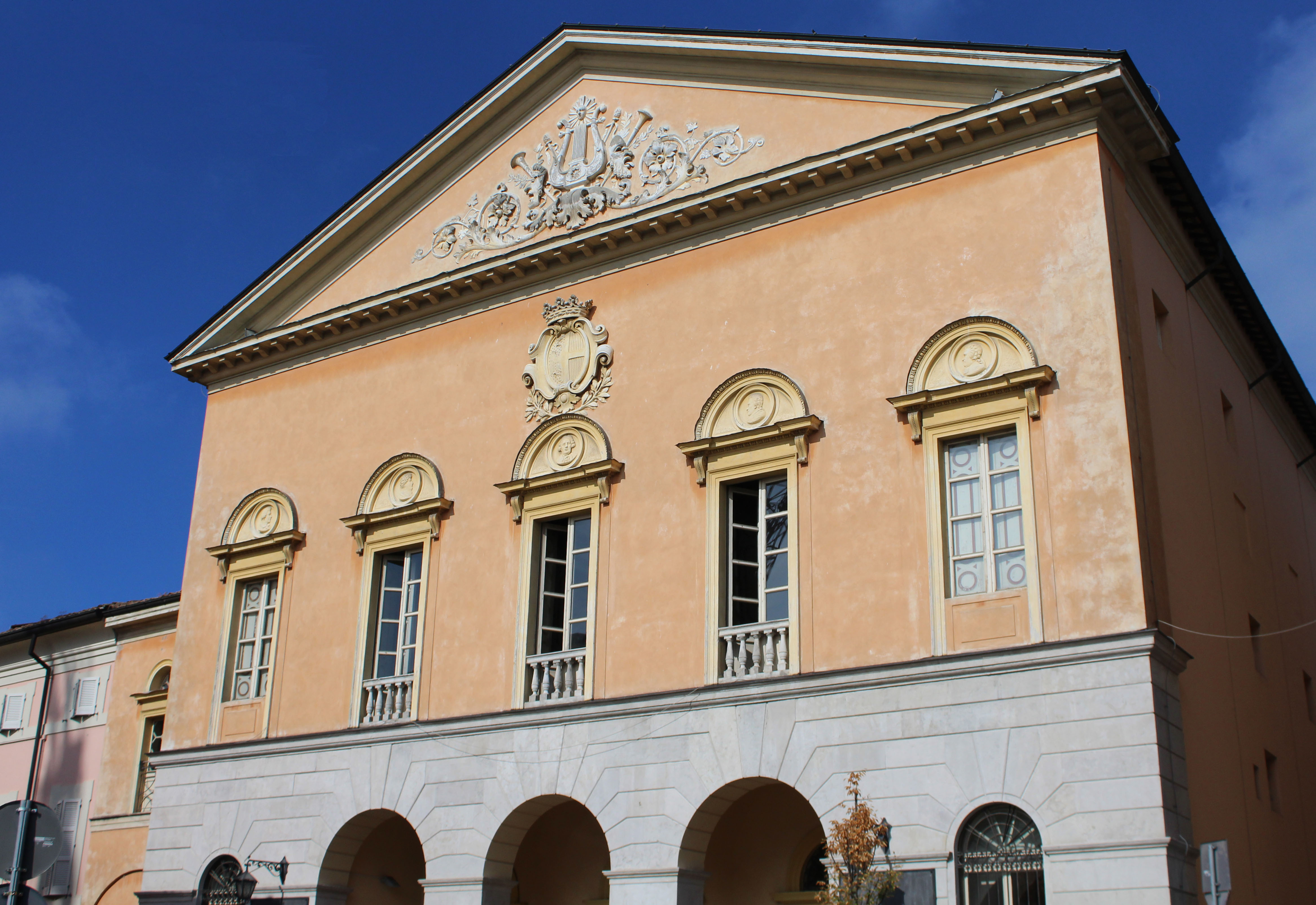 Teatro Girolamo Magnani This is a photo of a monument which is part of cultural heritage of Italy.